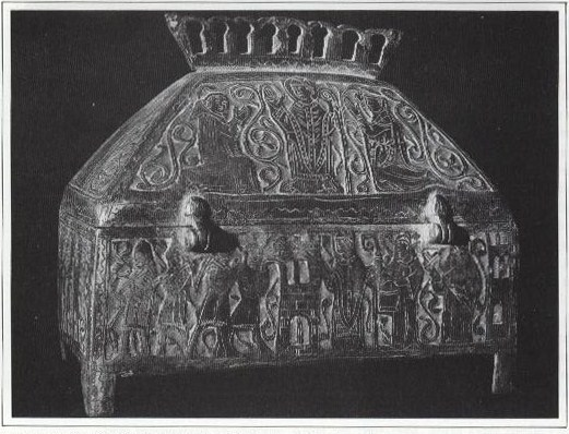 Chasse de Saint-Exupère, face le montrant en prédication (en haut) et arrêtant les Vandales aux portes de la ville, en-dessous. Appartenait au trésor de la basilique de Saint-Sernin de Toulouse.